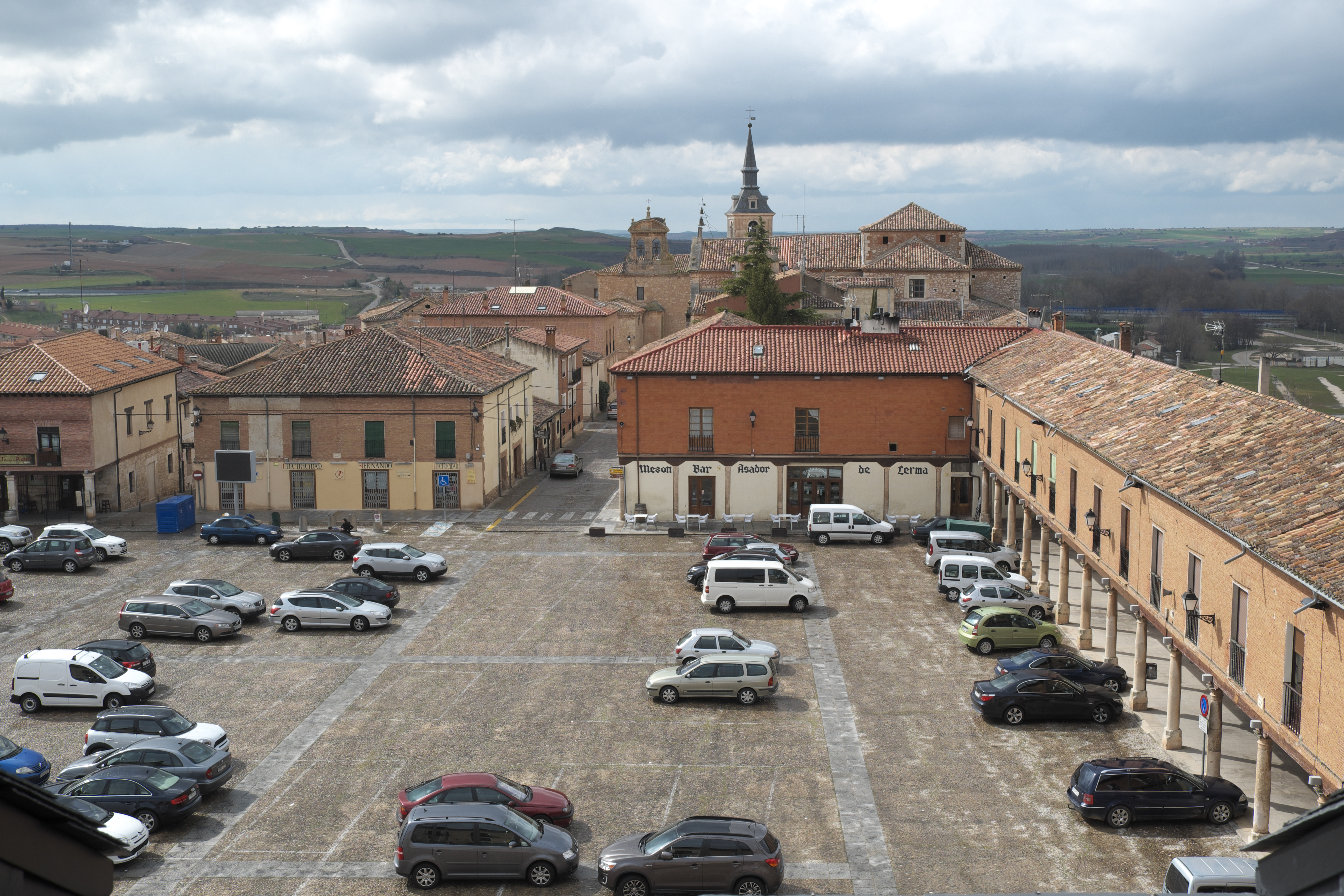 Plaza Mayor in Lerma in der Provinz Burgos (Kastilien und León/Spanien)